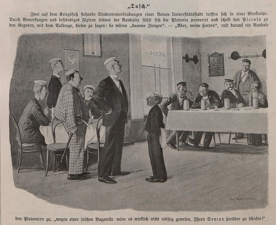 Lithografie einer Karikatur von Studentenverbindungen